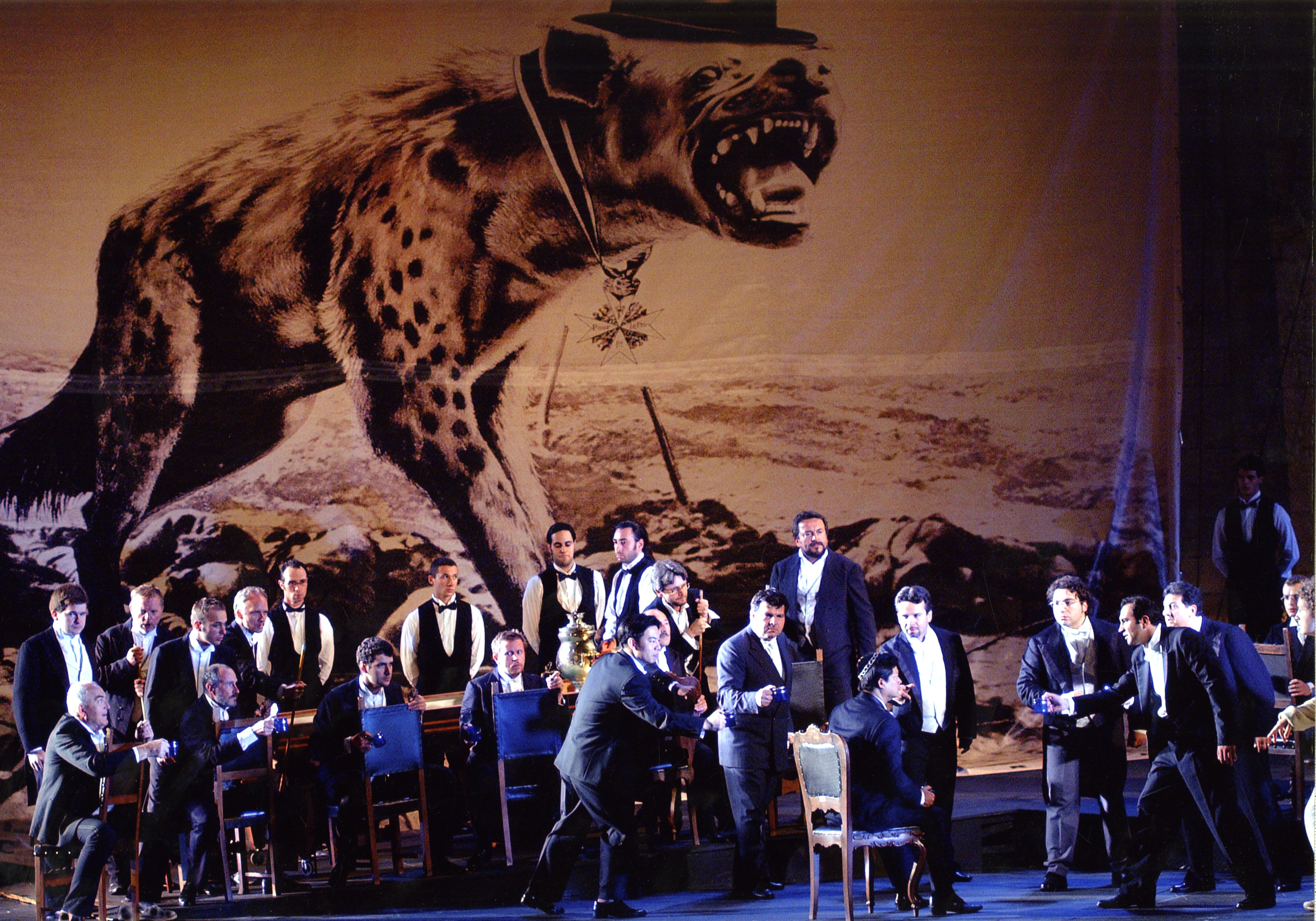 FDVI - Les Huguenots 2002